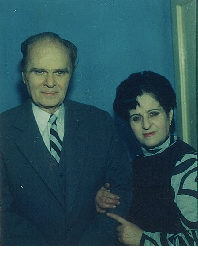 Foto te ndryshme nga jeta e Panajot Kanaçit